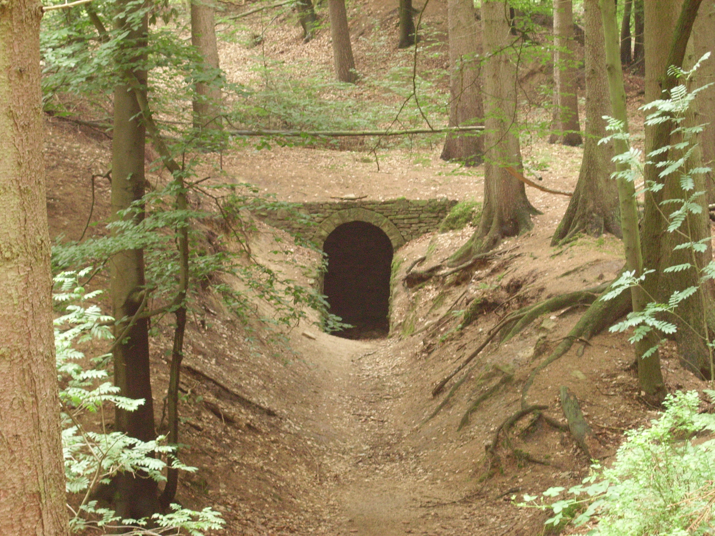 Mundloch des Steinbecker Stollens